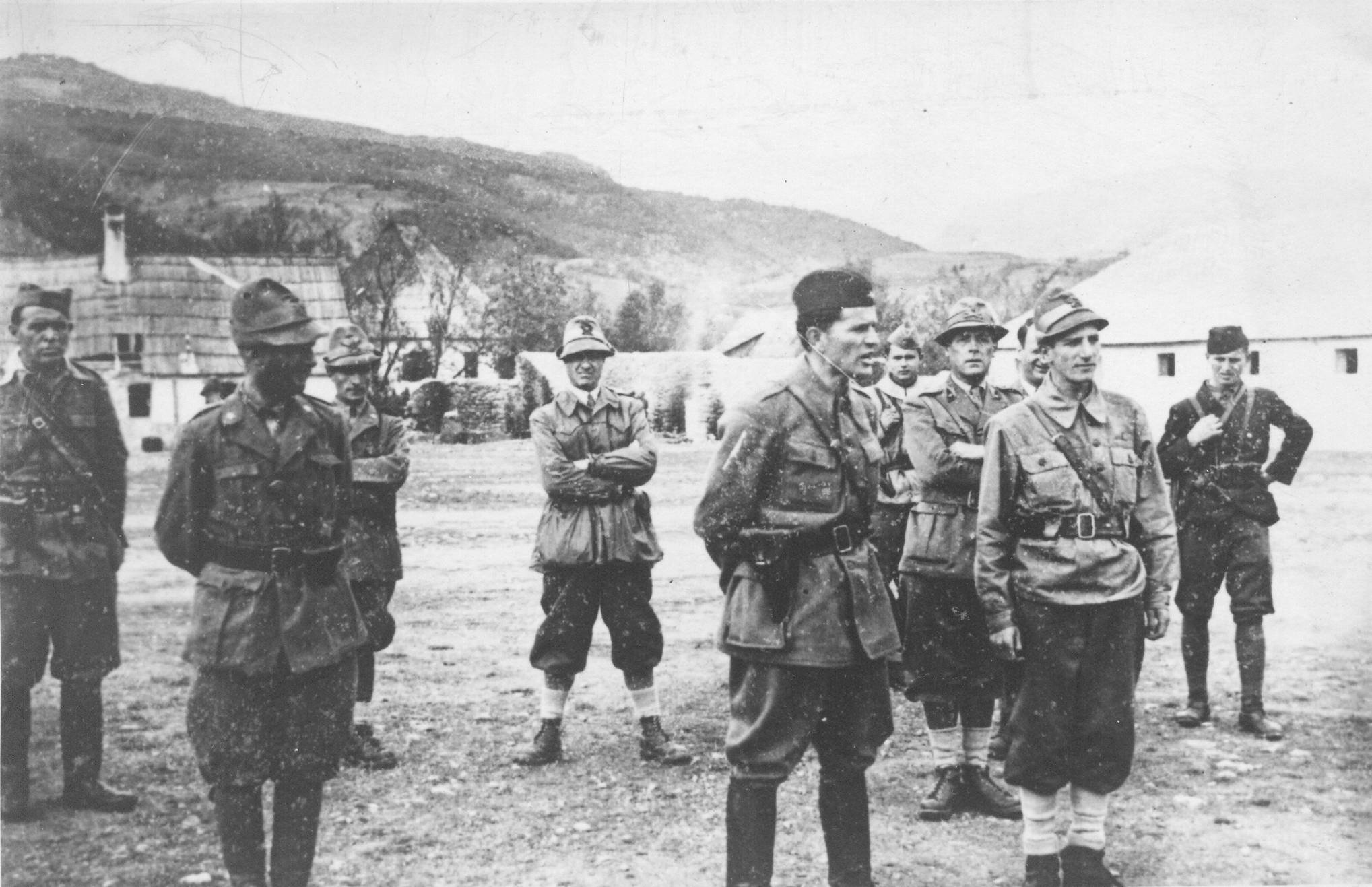 Srpskohrvatski / српскохрватски: Peko Dapčević komandant 2. udarnog korpusa NOVJ govori borcima italijanskog bataljona "Garibaldi", koji se priključio partizanskim jedinicama, Pljevija, septembra 1943.